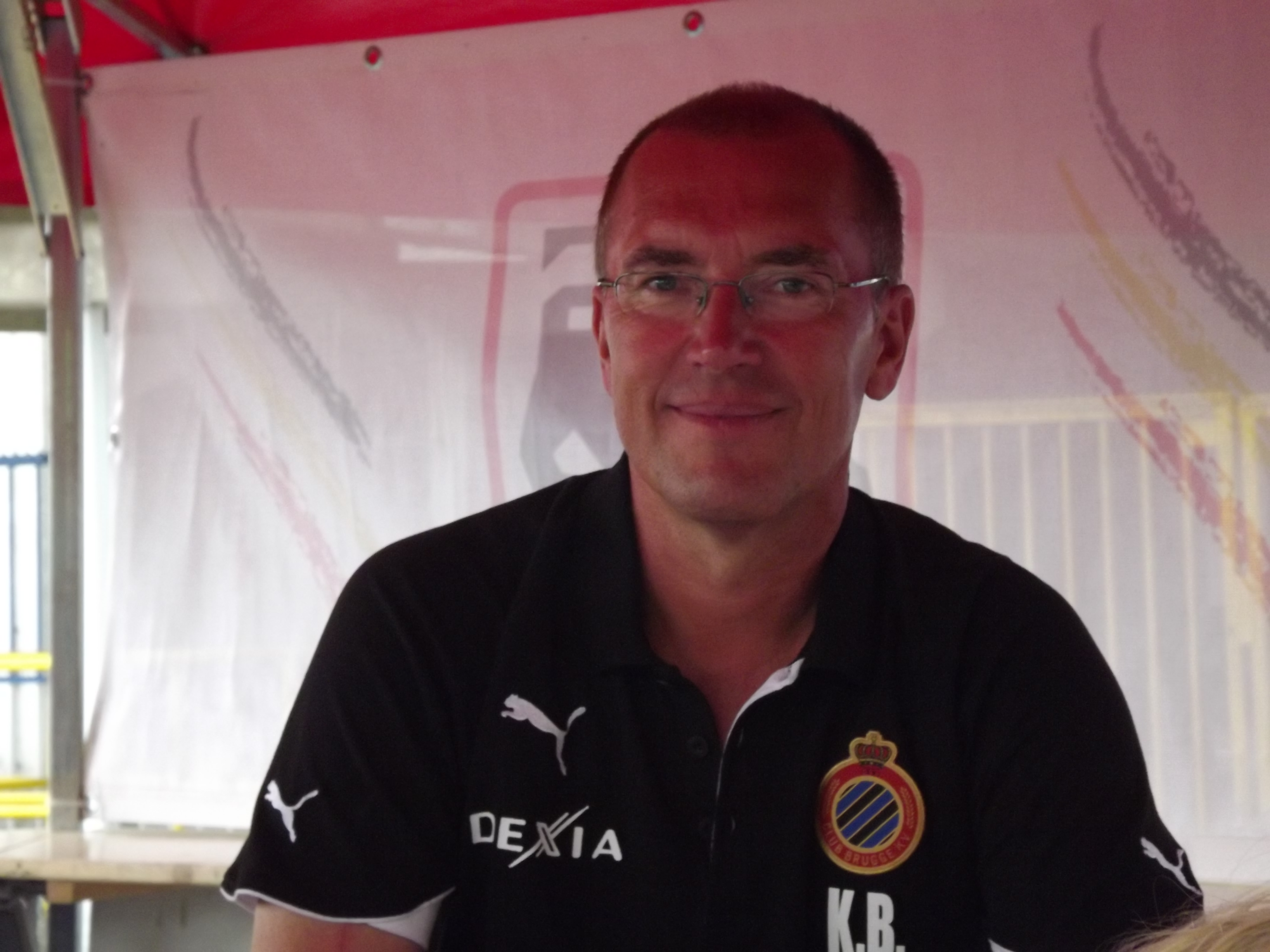 Foto van Kenneth Brylle, gemaakt op de fandag van Club Brugge, die plaatsvond op 10 juli 2011